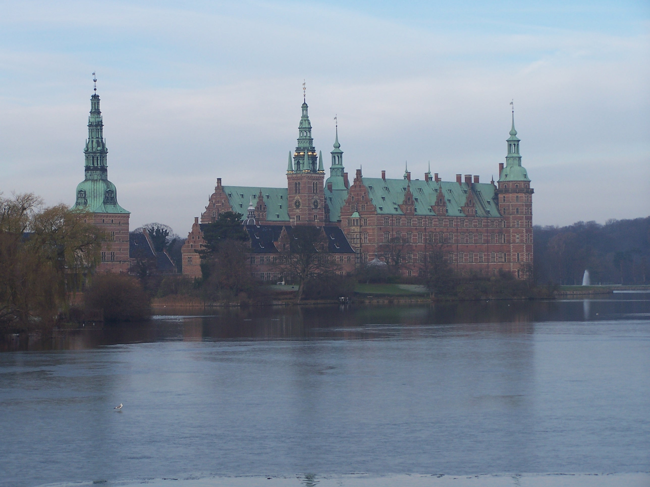 2005, Niels Elgaard Larsen Frederiksborg castle, seen from Hillerød